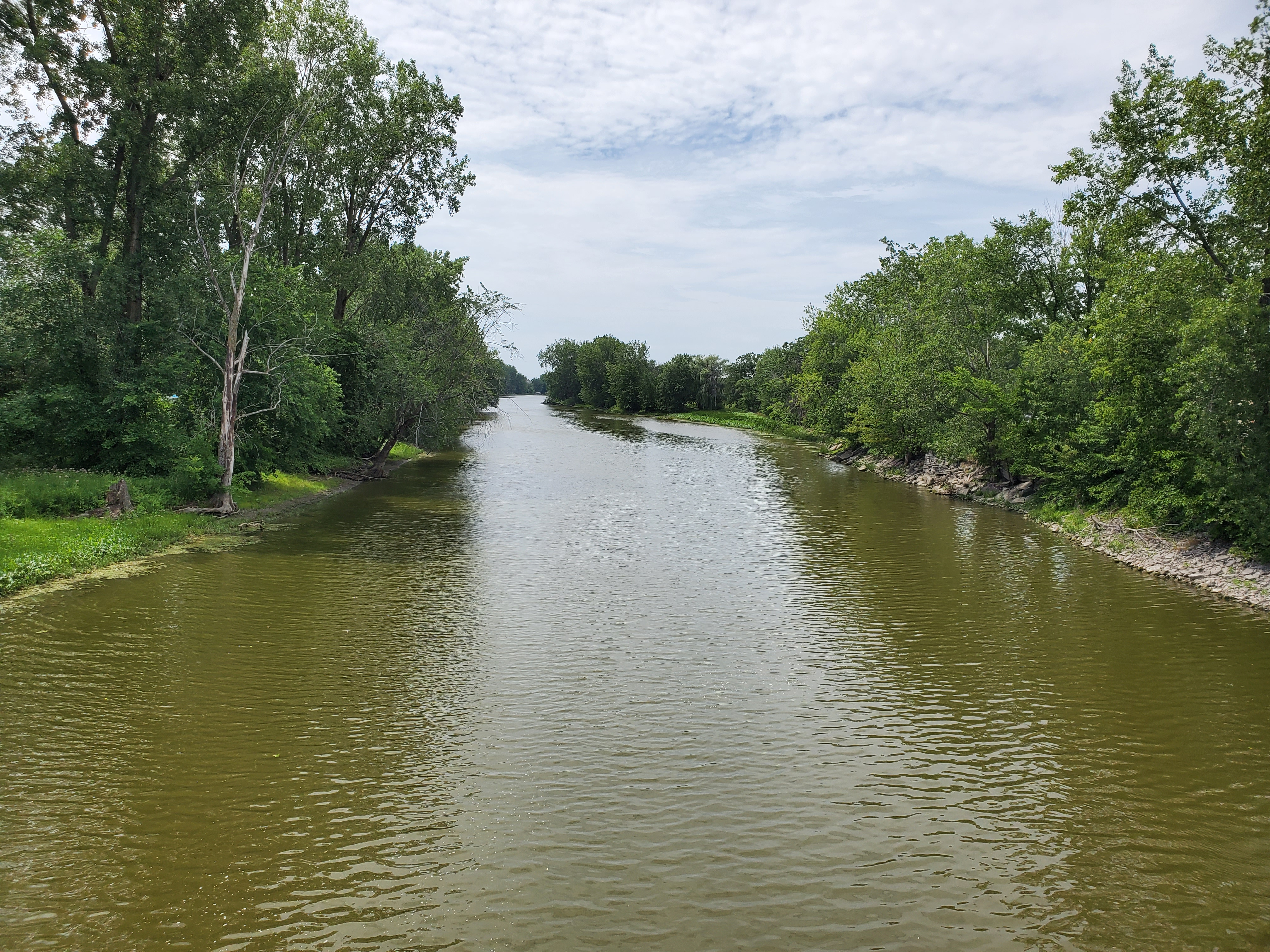 Rivière l'Acadie, vu de l'aval à partir du pont menant à l'Île Goyer, soit à 1,1 km de sa confluence avec la rivière Richelieu.